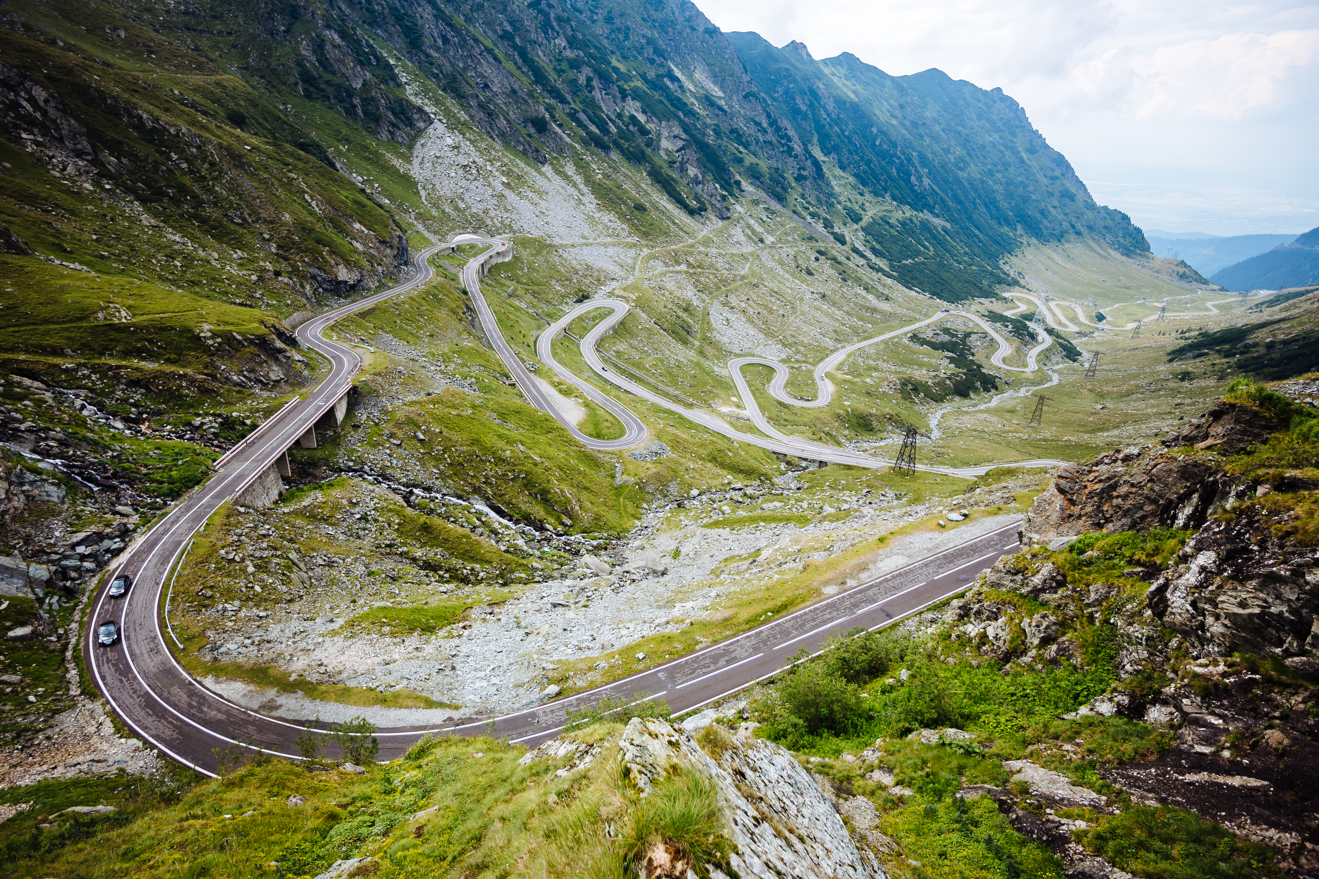 Transfăgărășan I